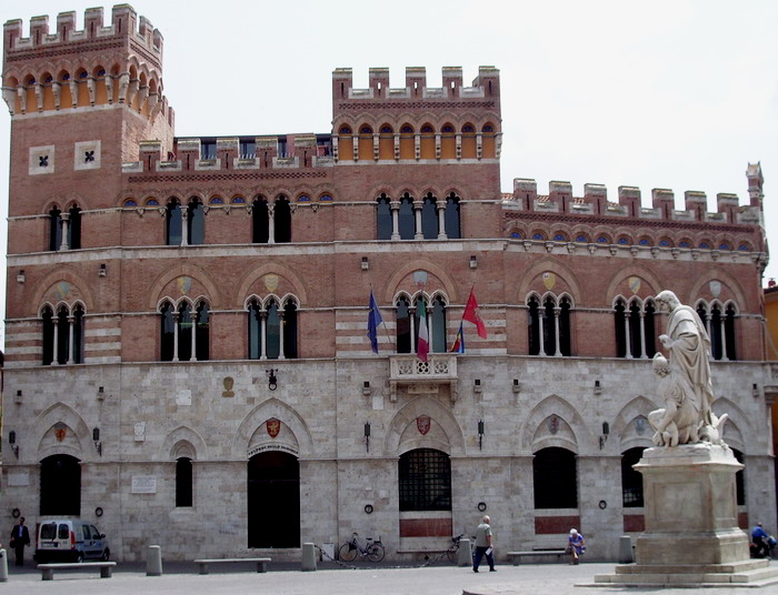 Palazzo Aldobrandeschi a Grosseto, Tuscany (Italy)